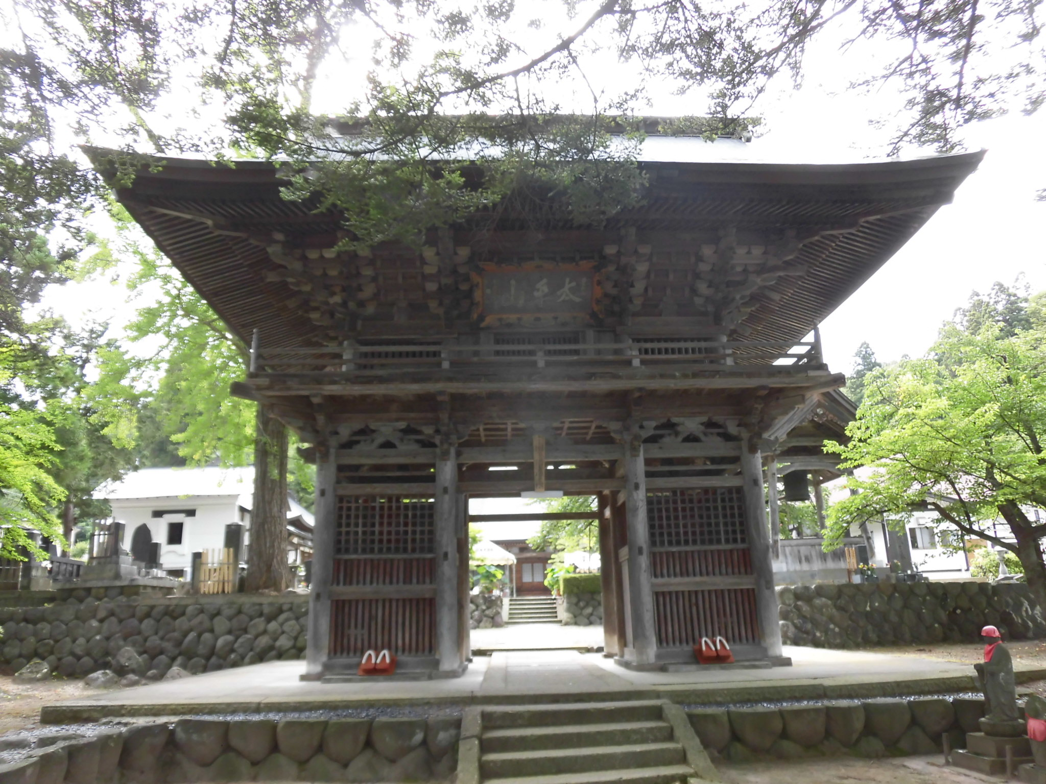 安国寺の楼門。一国一個出羽国安国寺。山形県東村山郡山辺町大寺。1339年（延元4年）建立。現在の楼門は宝暦14年に完成。山形県指定有形文化財。